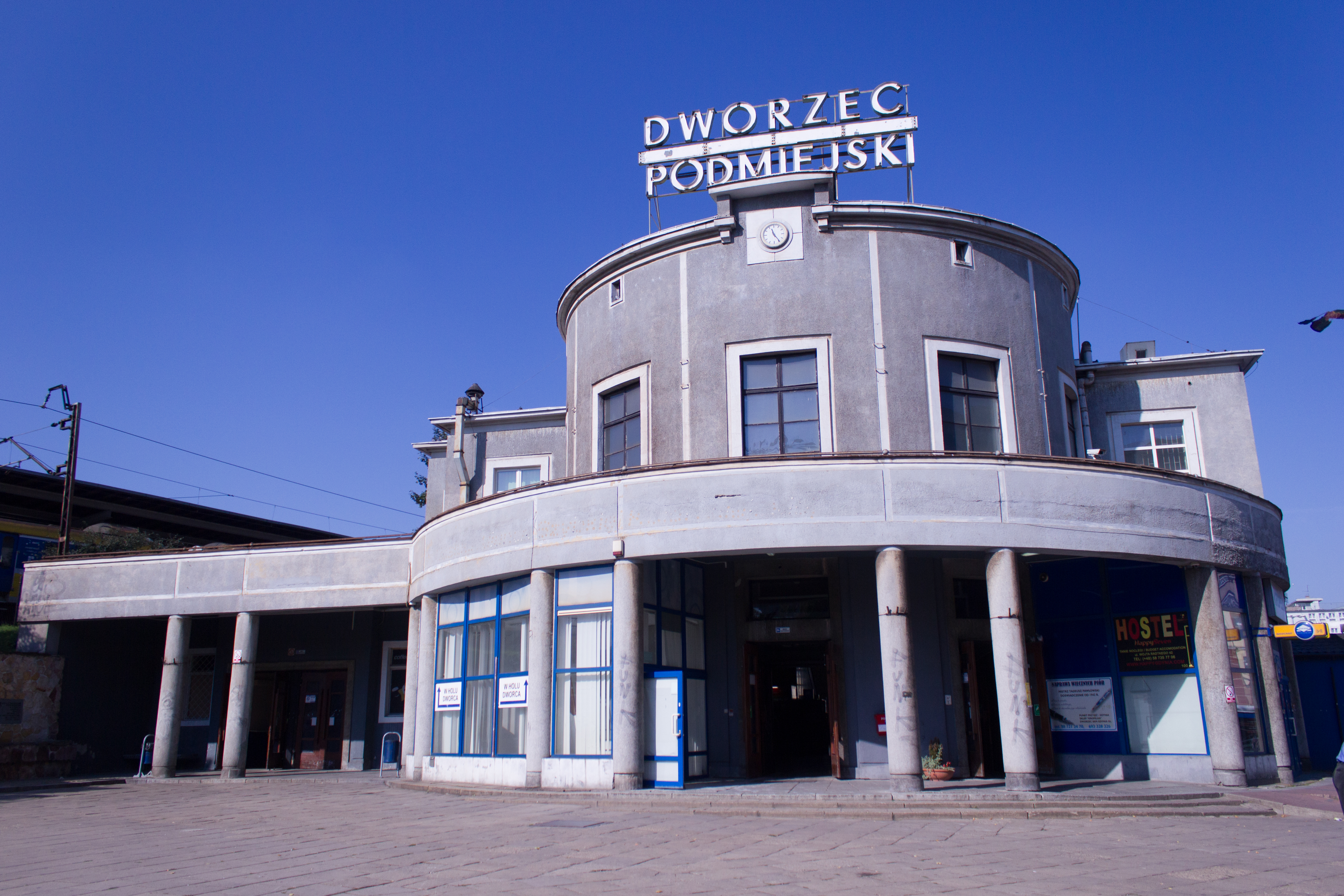 Zespół dworca kolejowego w skład którego wchodzą: dworzec główny, dworzec podmiejski i kolumnowy pasaż komunikacyjny Plac Konstytucji 1, Gdynia